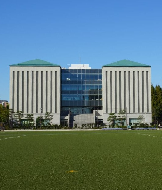 獨協大学東棟